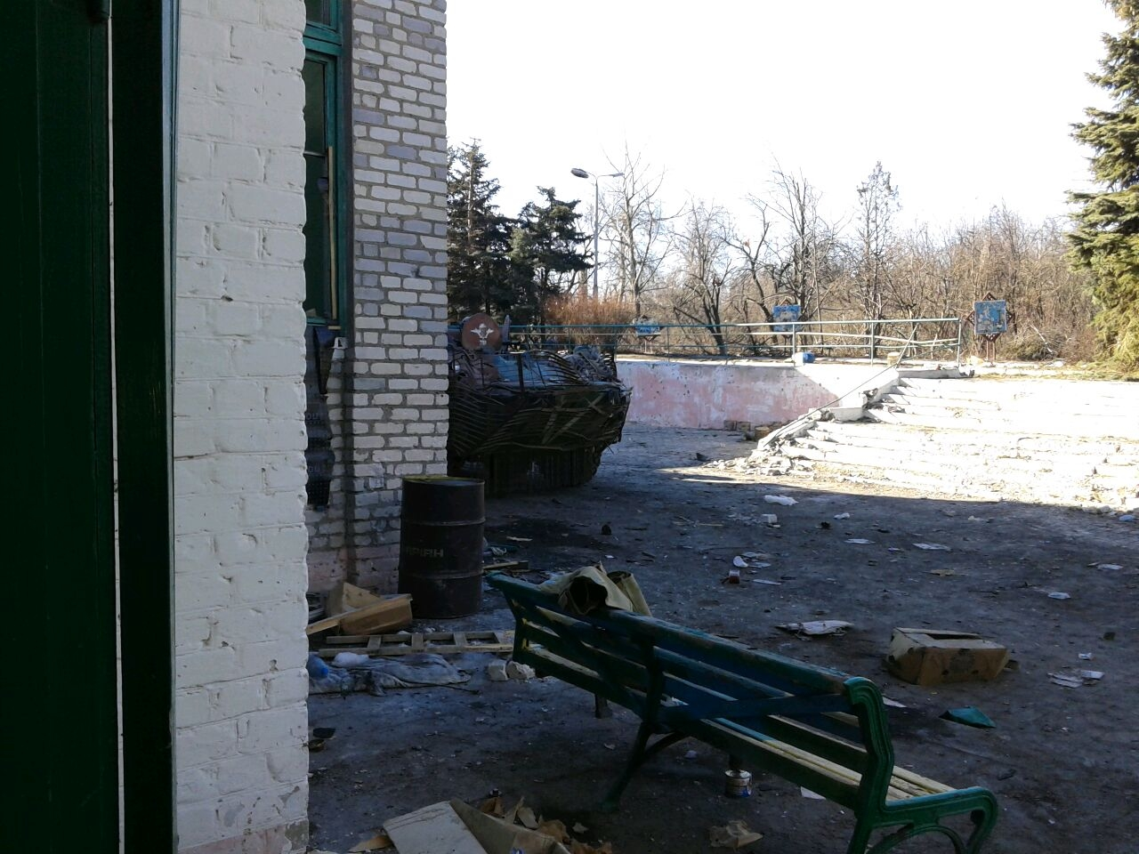 Лютий 2015 - база відпочинку "Маяк" в .Широкине. Донецька область Україна